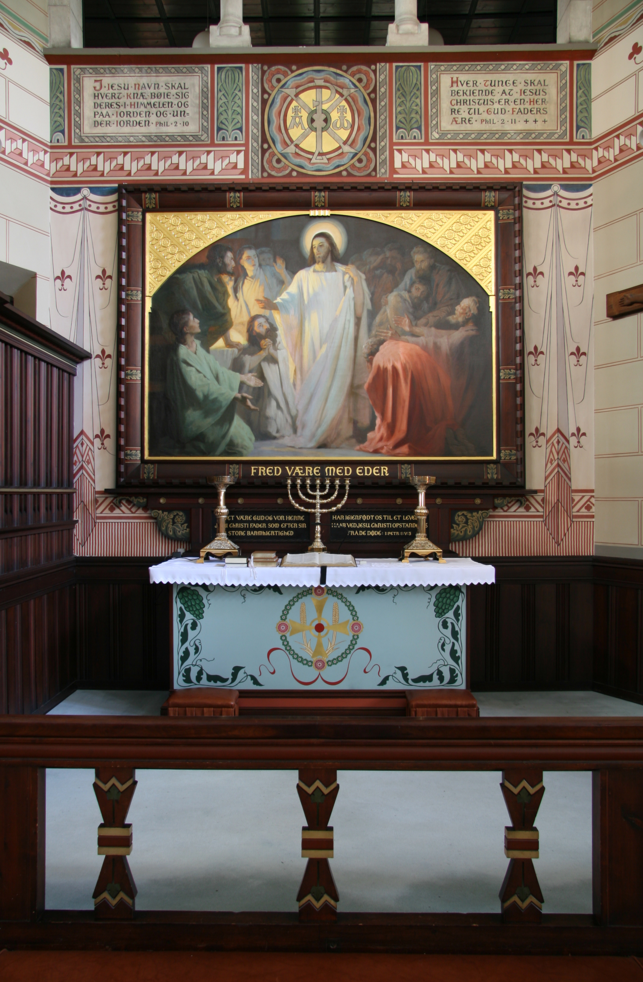 Sankt Lukas Kirke in Copenhagen, Denmark. Altar